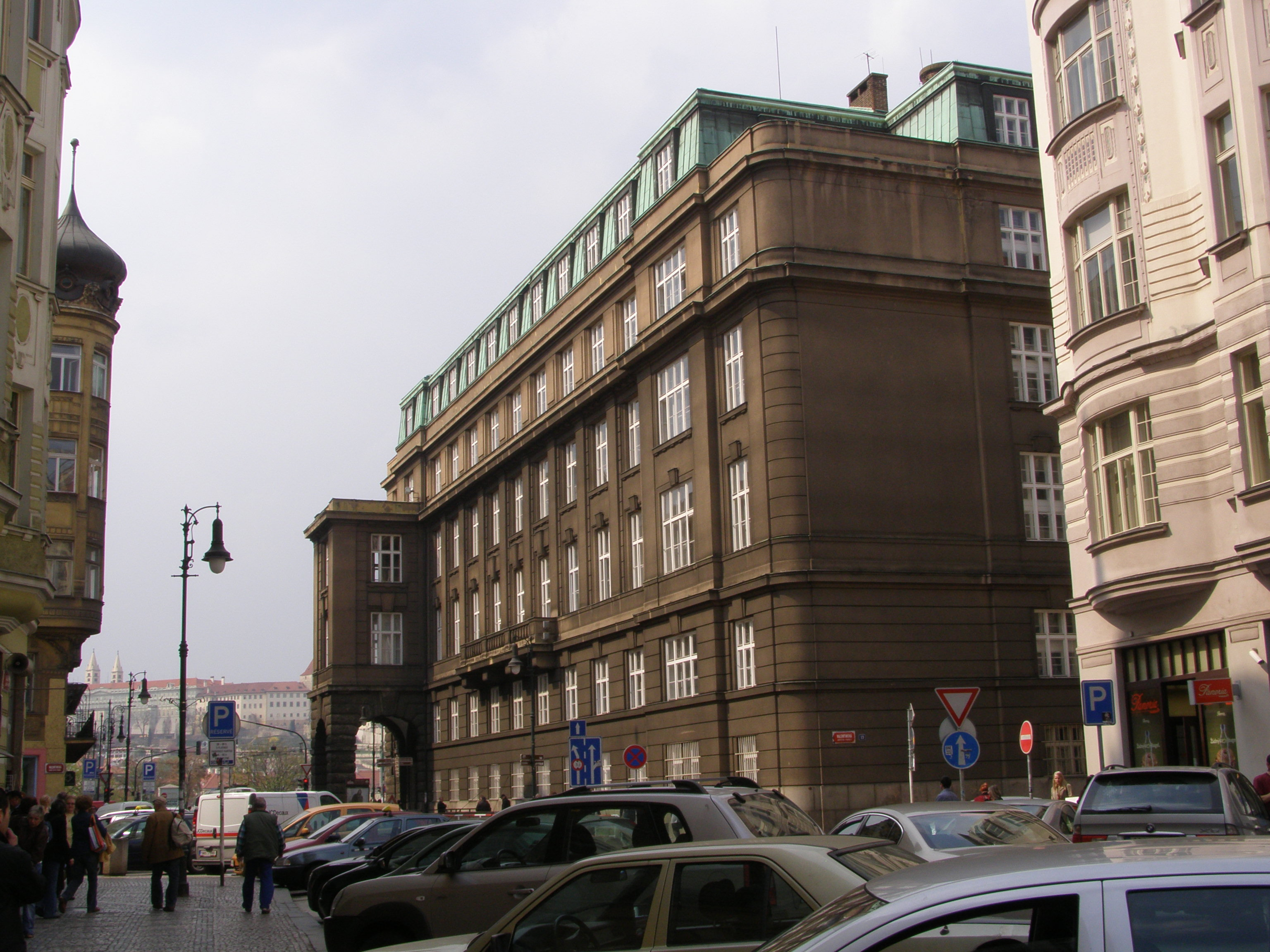 Praha, ulice Kaprova, hlavní budova Filozofické fakulty Univerzity Karlovy